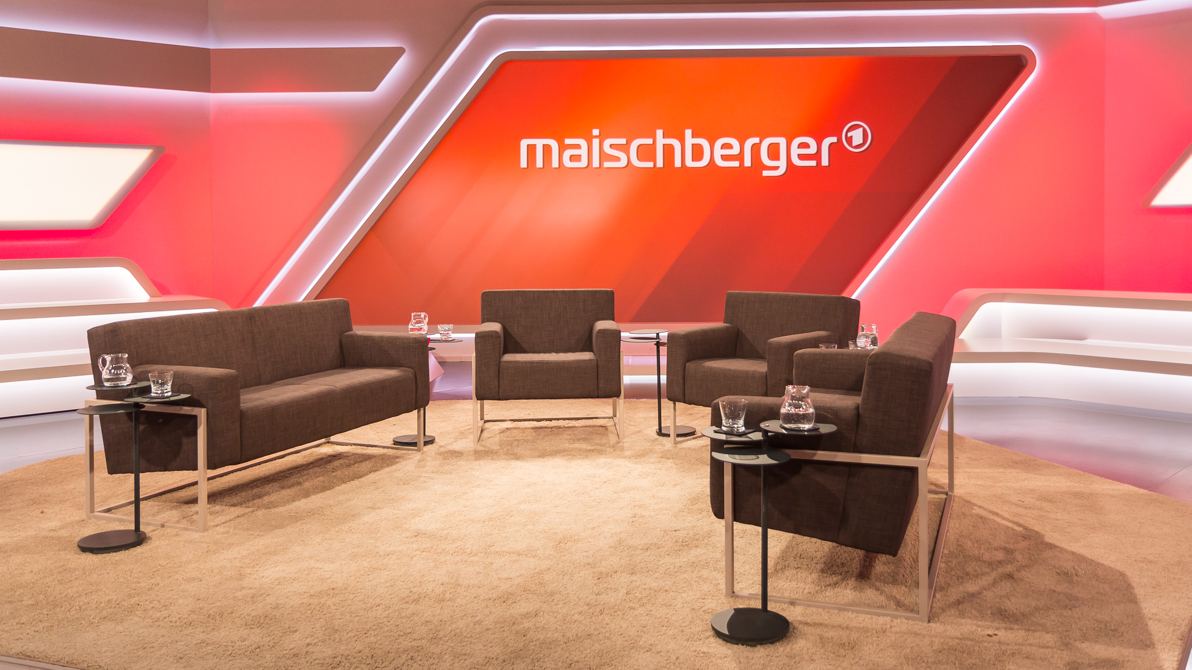 Maischberger, Studio ohne Gäste